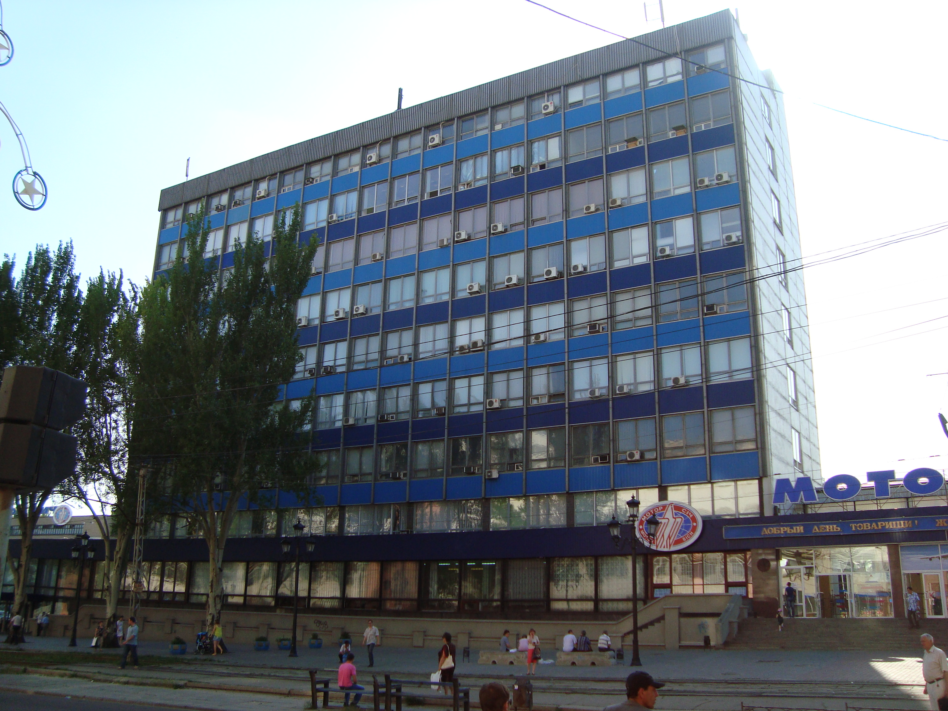 Административное здание ОАО «Мотор Сич», одного из ведущих предприятий в мире по разработке, производству, ремонту и сервисному обслуживанию авиационных газотурбинных двигателей для самолётов и вертолётов. Расположено на юго-востоке Украины в городе Запорожье.